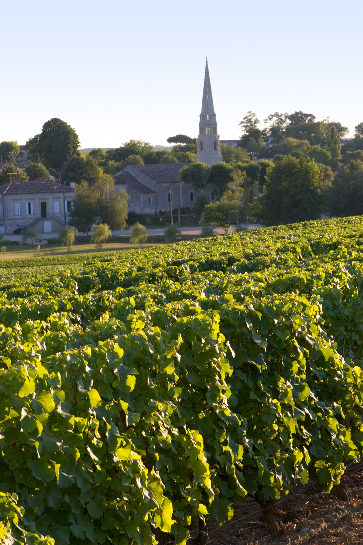 Village et vignoble, Sauternes, France.